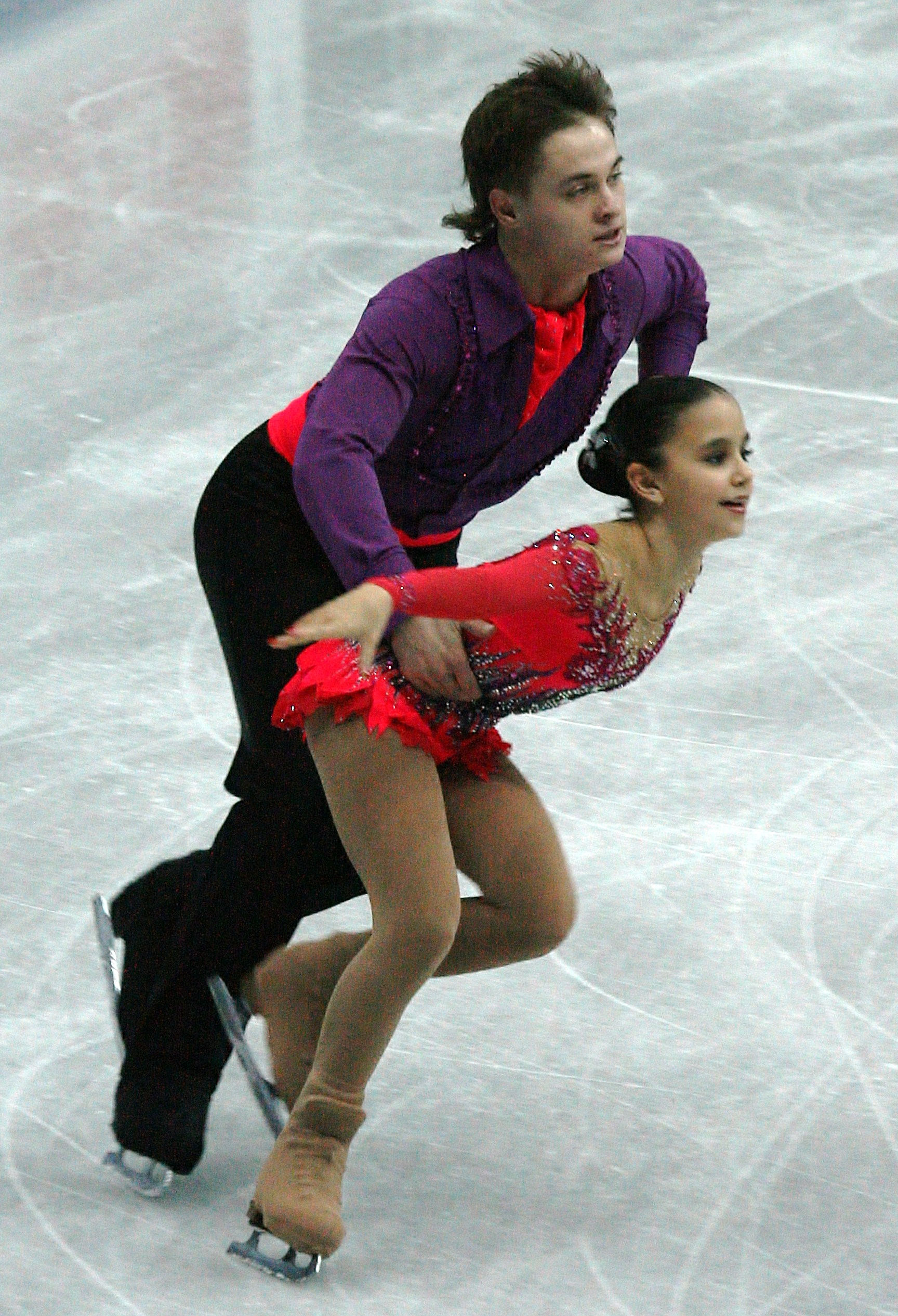 Лина Фёдорова и Максим Мирошкин (Россия) на финале Гран-при среди юниоров 2012-2013. Произвольная программа.